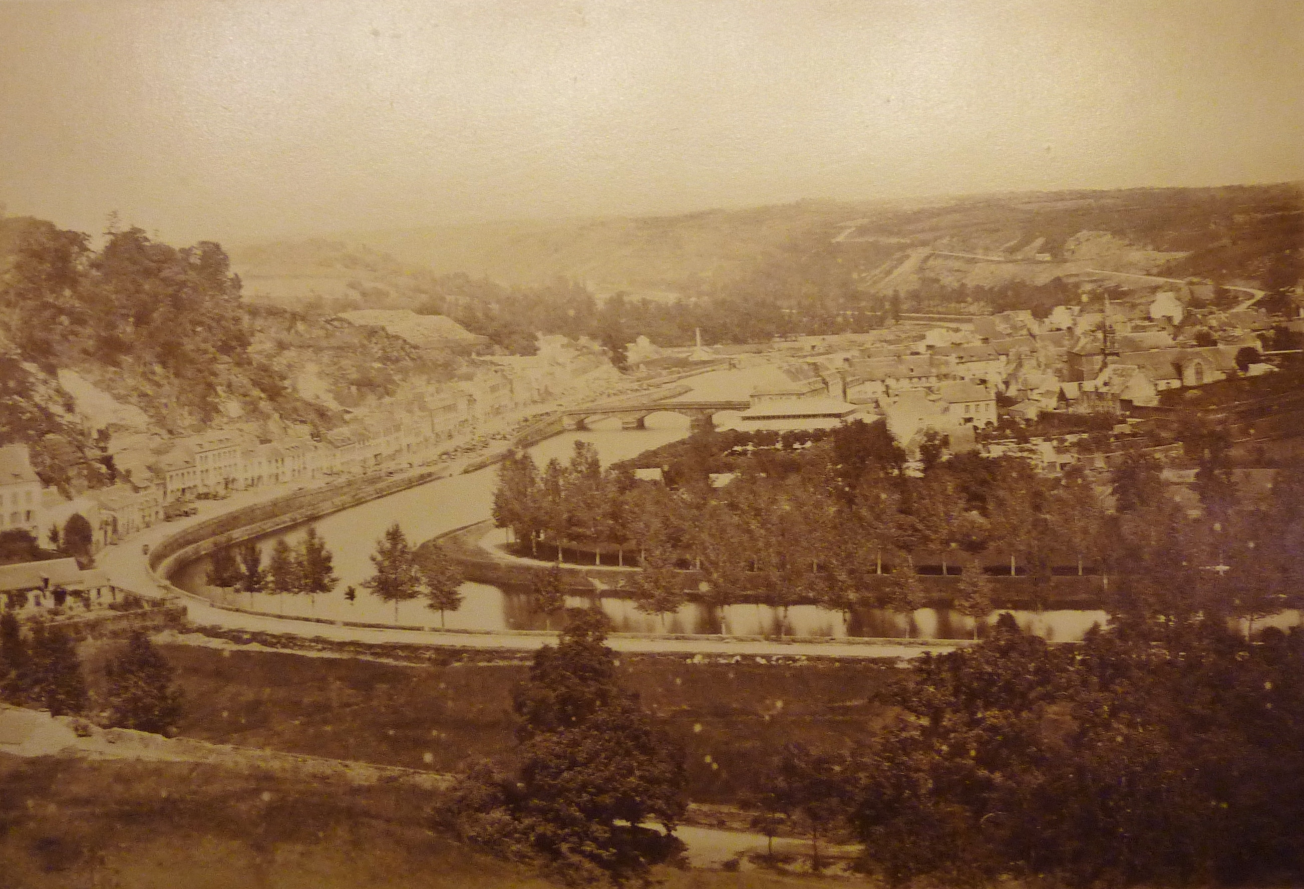 Châteaulin dans la seconde moitié du XIXe siècle (photographe inconnu, musée de Bretagne)